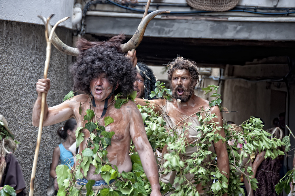 En la Villa de Benabarre, en la provincia de Huesca (España). Celebran la fiesta de los salvajes. La gente del pueblo se disfraza de salvaje y ba llamando a todas la puertas pidiendo que les den comida. La gente , tabto por la calle como desde las casas les da todo tipo de verduras. Realmente una fiesta popular y muy simpática